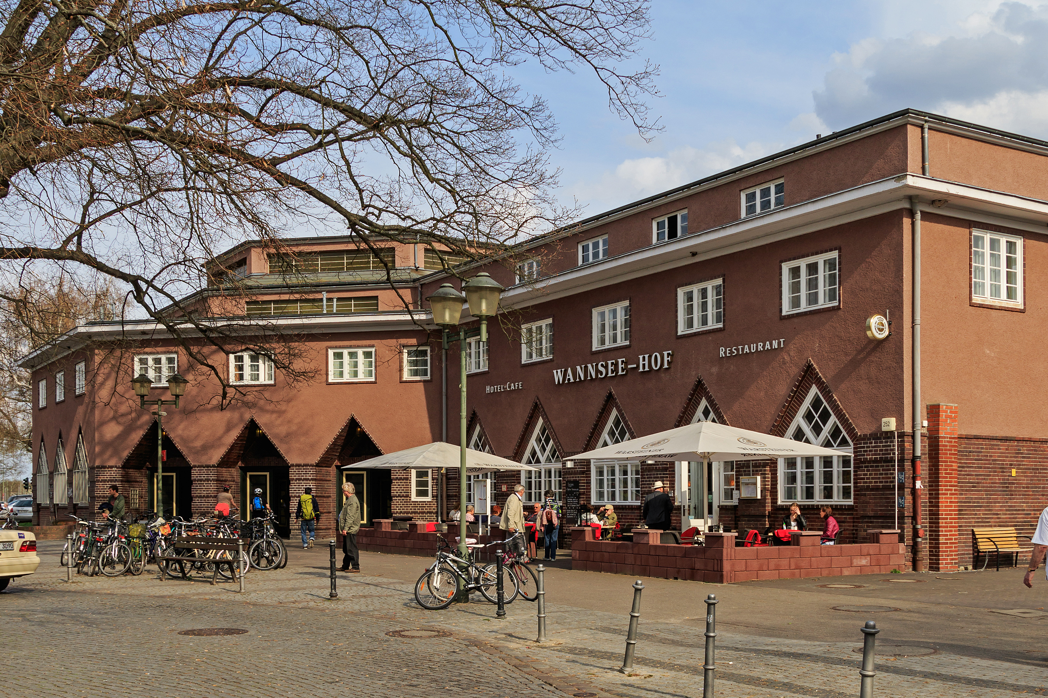 Das Empfangsgebäude des Bahnhofs Berlin-Wannsee am Gustav-Hartmann-Platz